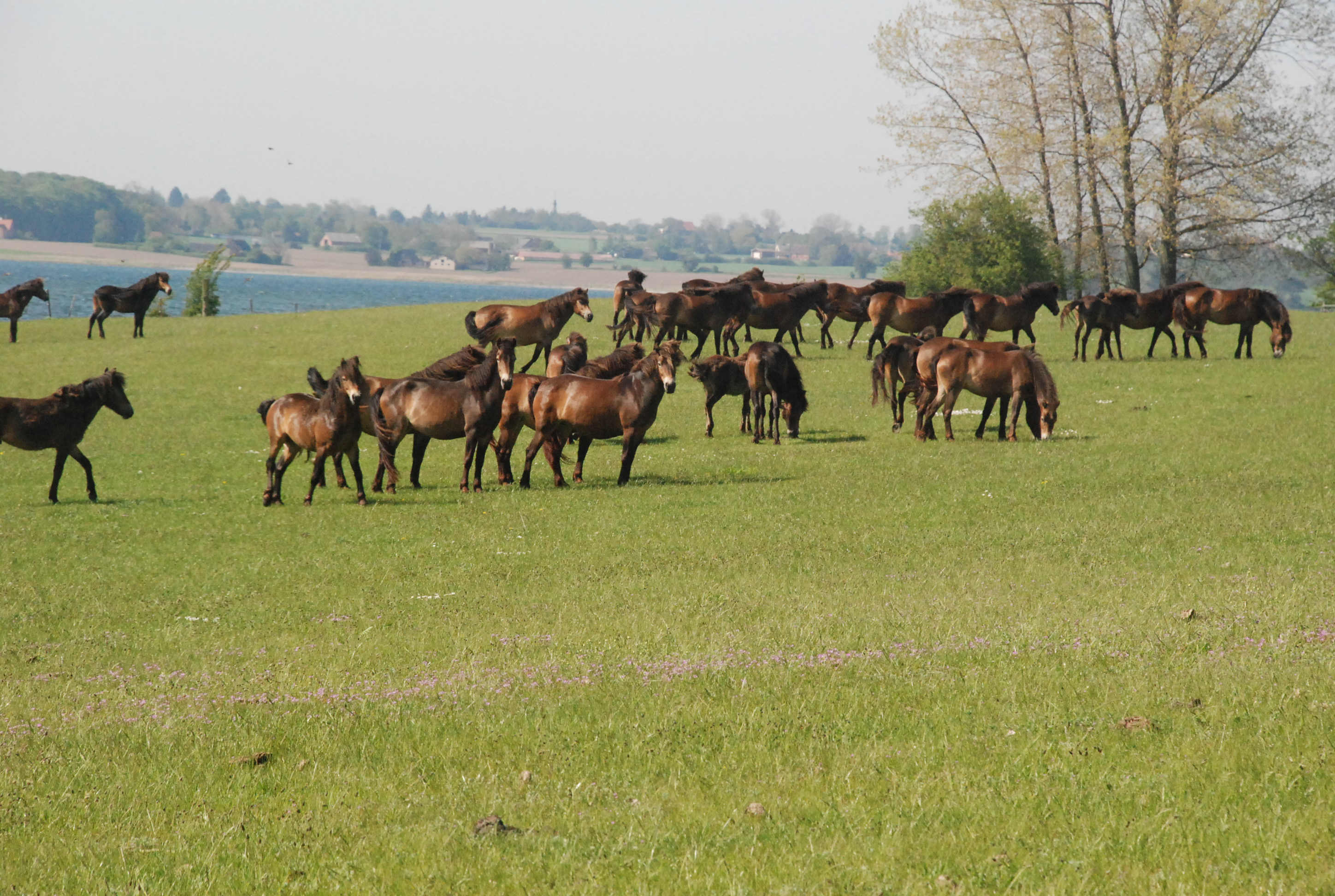 Heste på Tærø, maj 2017. Foto Kåre Fog